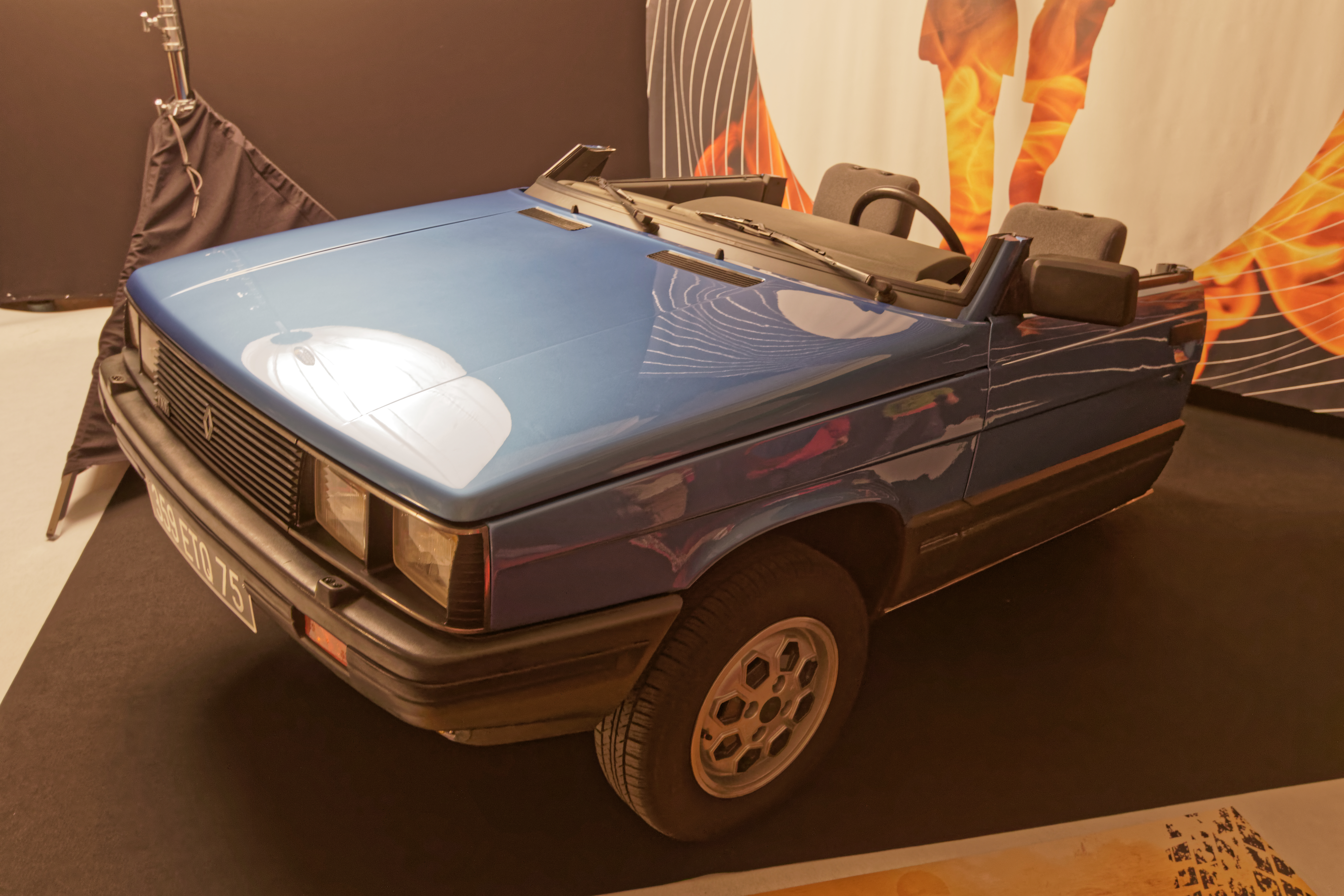 Une Renault 11 Taxi de 1985 présentée lors du mondial de l'automobile de Paris 2016. Ce véhicule a été utiisé sur le tournage du film Dangereusement Vôtre.